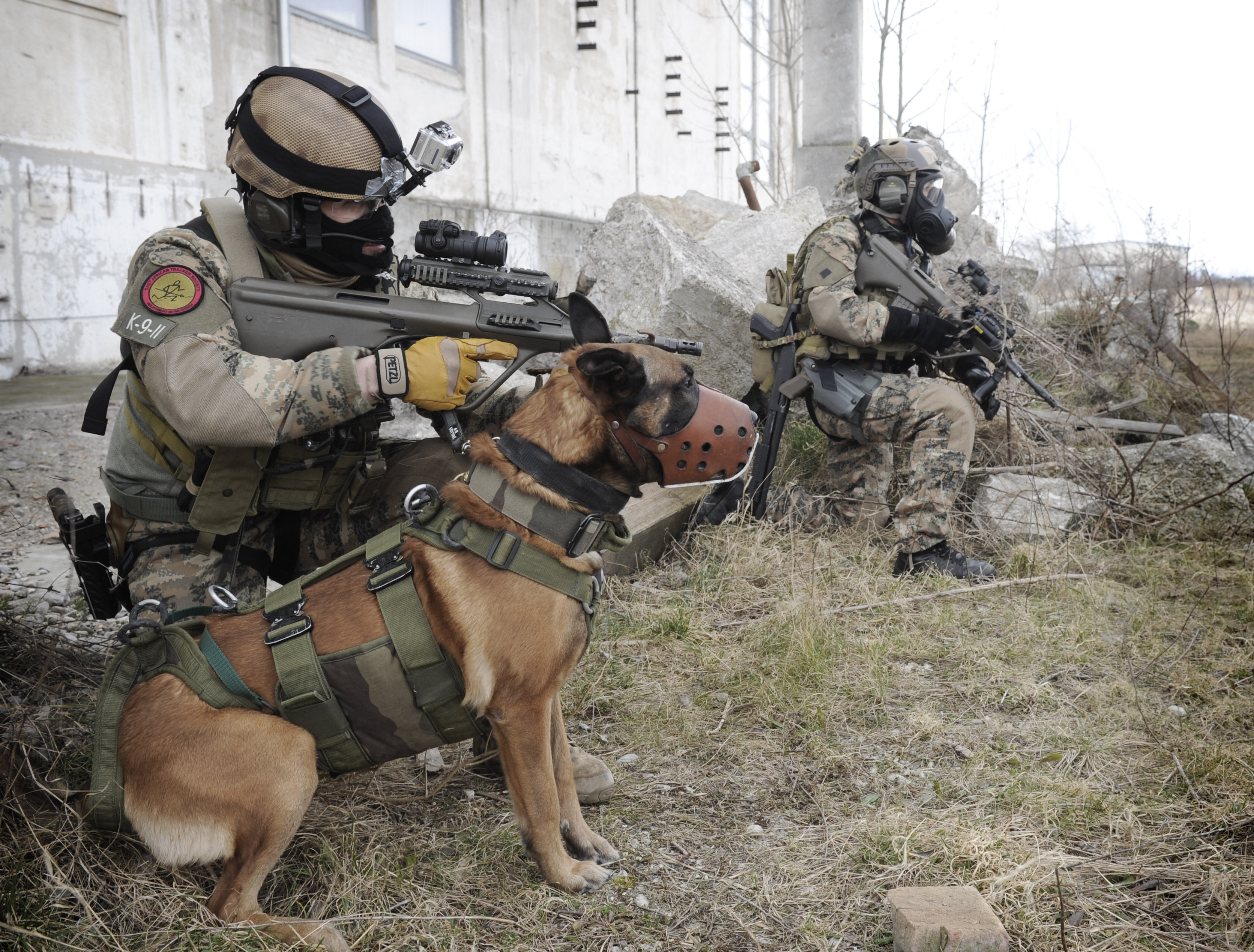 Aushebung eines Sprengstofflabors durch das Jagdkommando. Ort: Tritolwerk